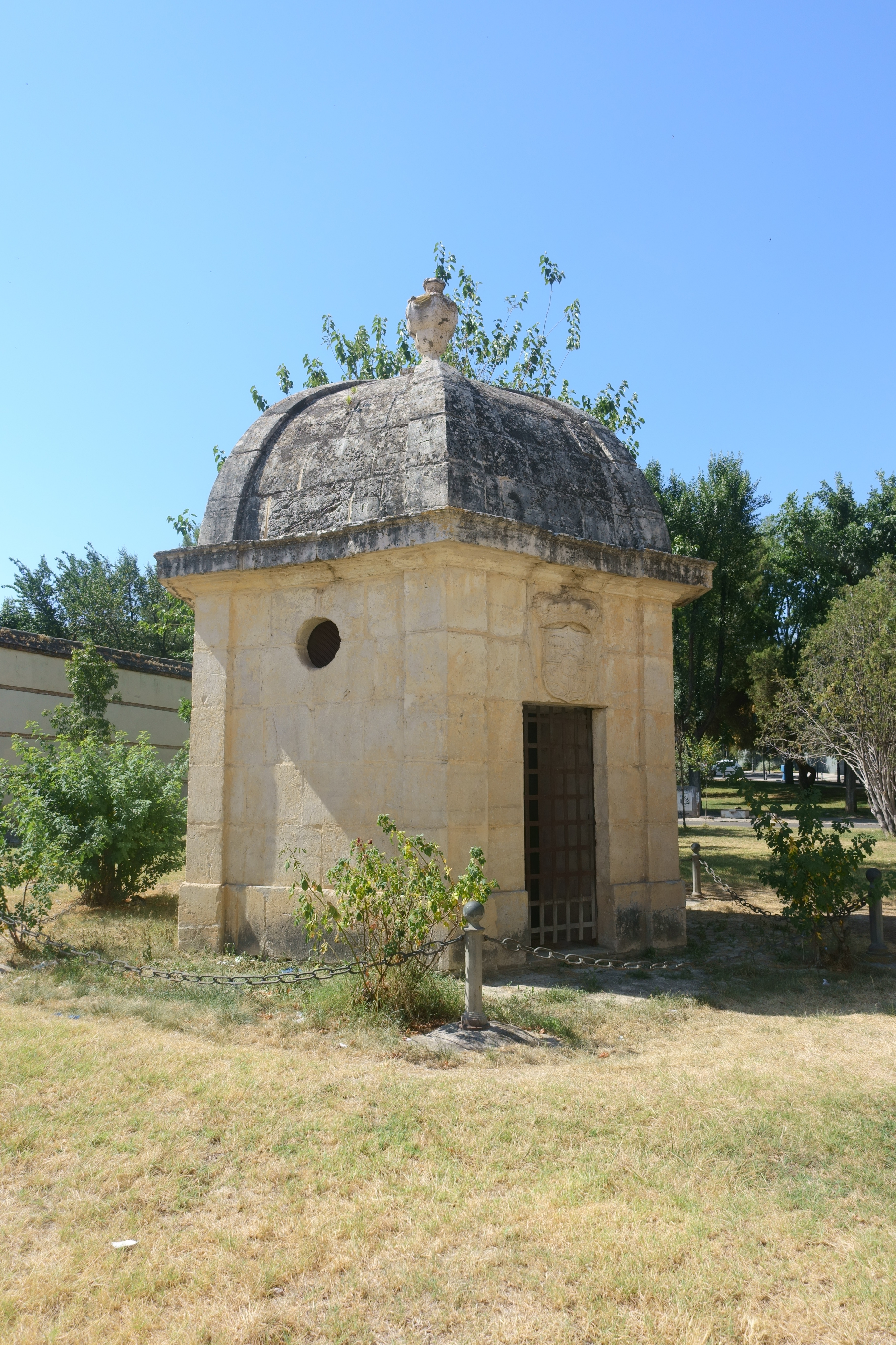 Arca de agua, del antiguo viaje de aguas desde Ocaña, en Aranjuez (Madrid, España).